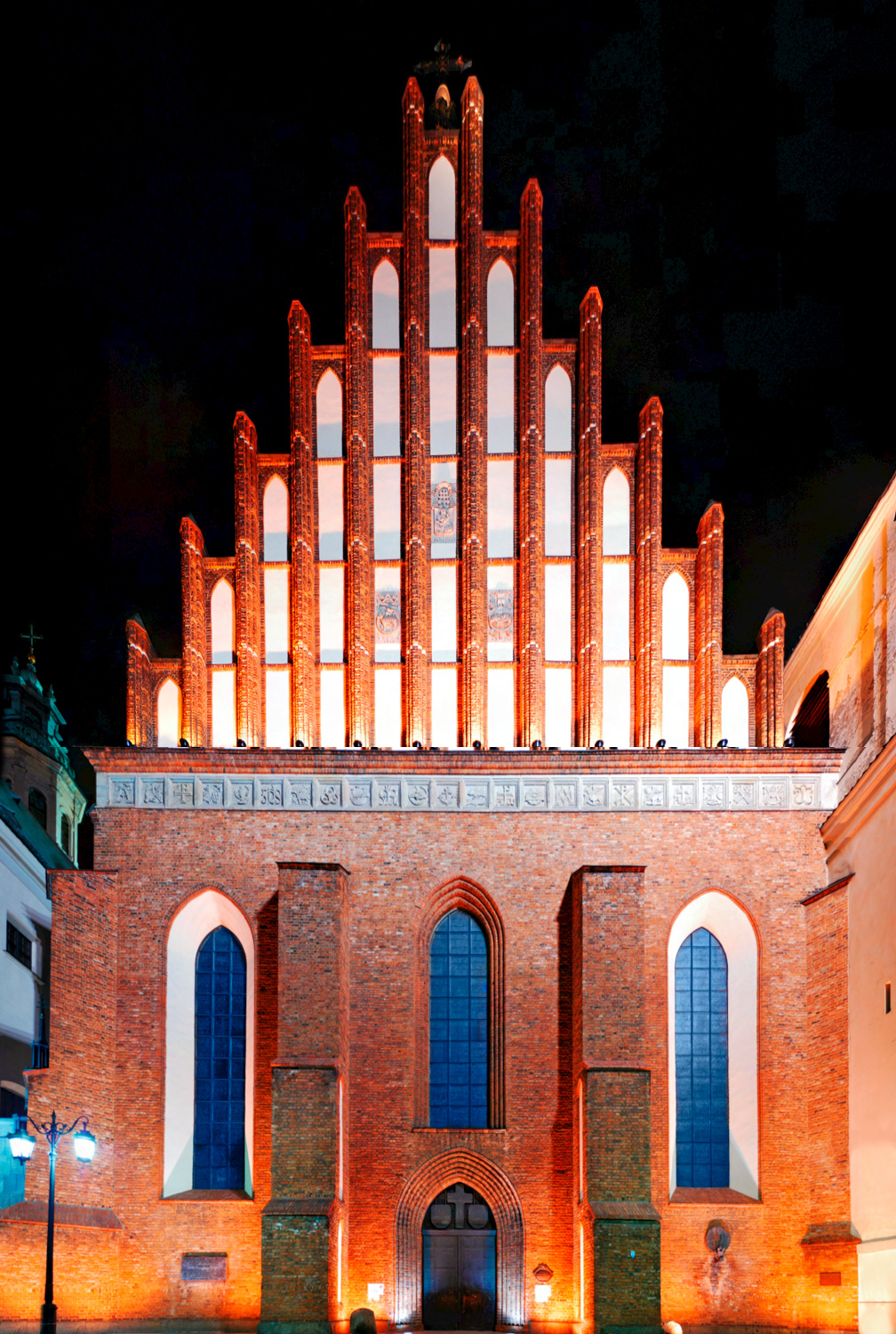 Warszawa, Katedra p.w. św. Jana, pocz. XV, XVII, po. 1945